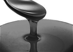 Zähflüssiges Bitumen